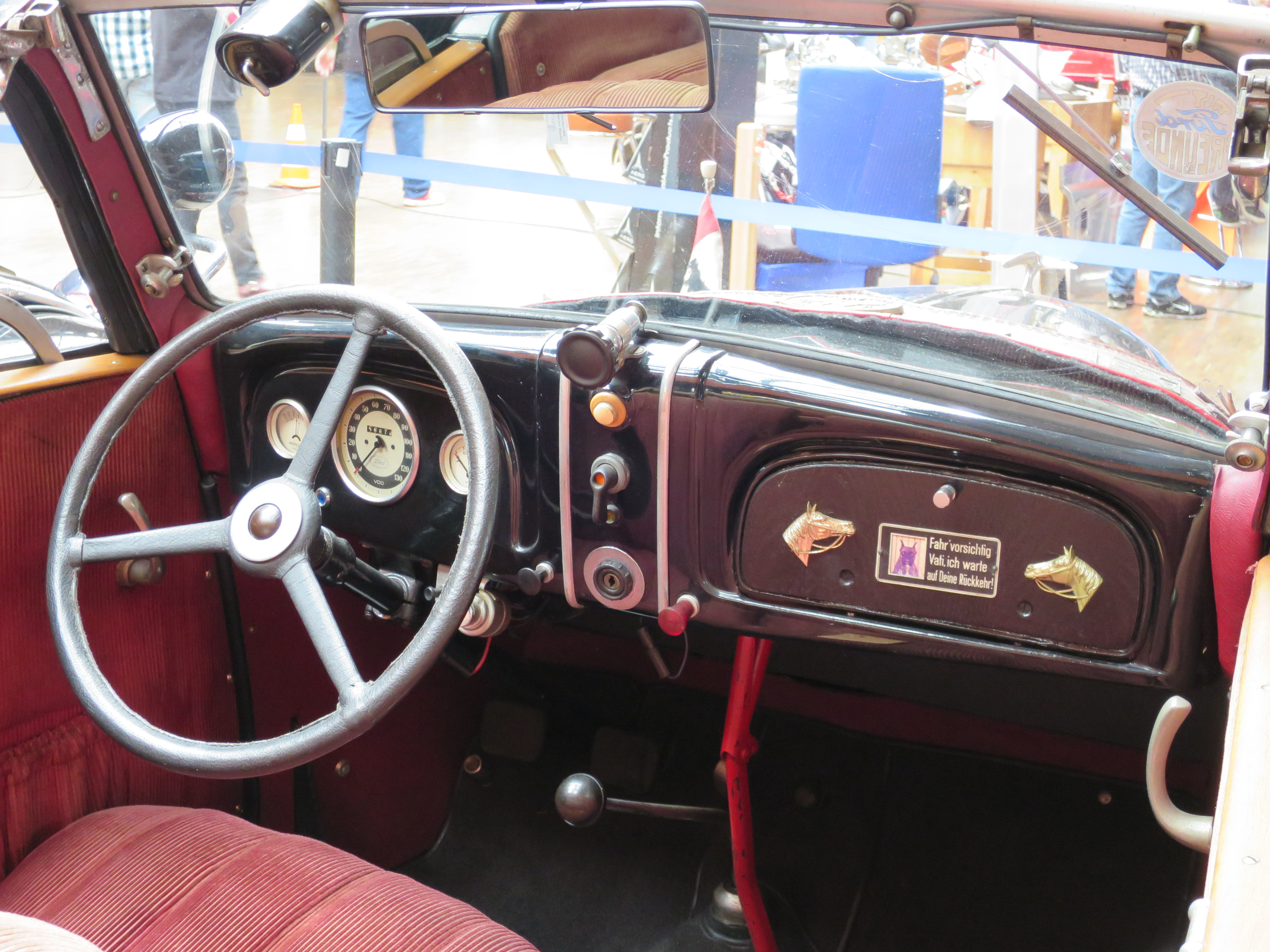 Fiat 508 Balilla